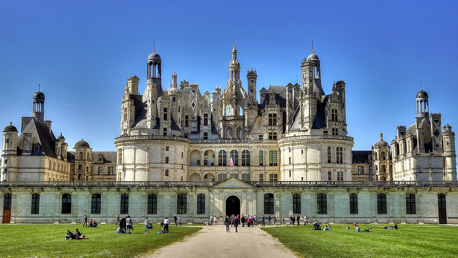 Chateau de Chambord